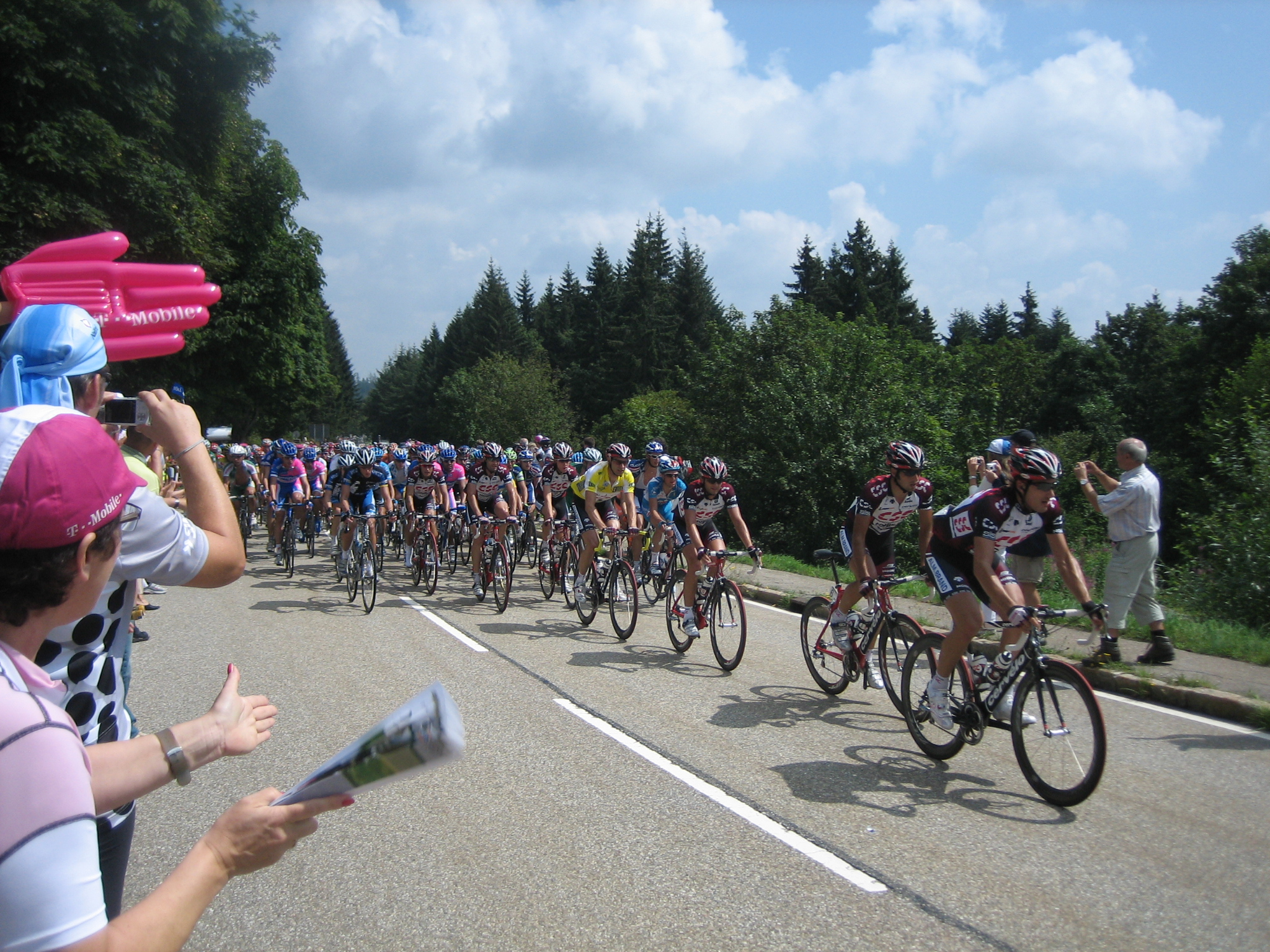 Hauptfeld bei der 3. Etappe der Deutschlandtour 2007. Der Fahrer im Gelben Trikot ist Jens Voigt. Aufnahmeort: Ruhestein im Schwarzwald.